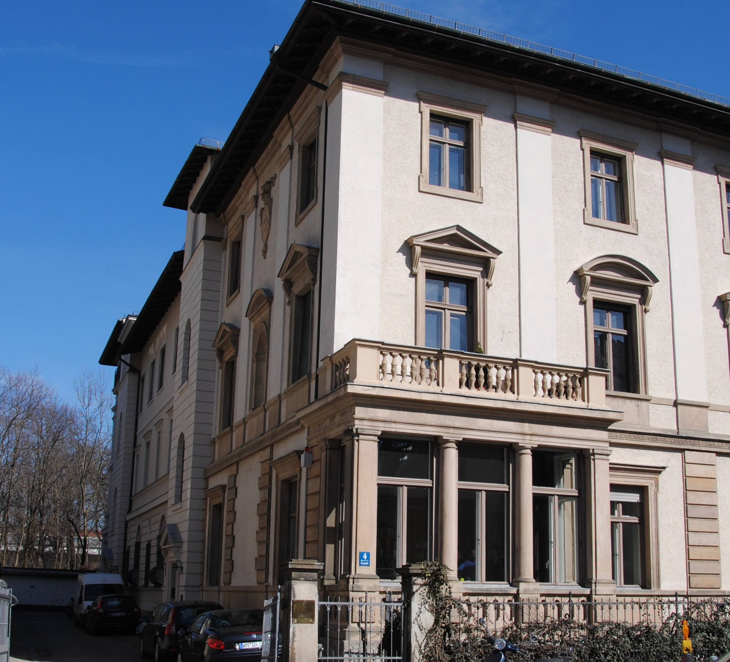 Villa von August Thiersch (Sitz des Piper Verlags) in Georgenstraße 4, Schwabing, München, Deutschland.